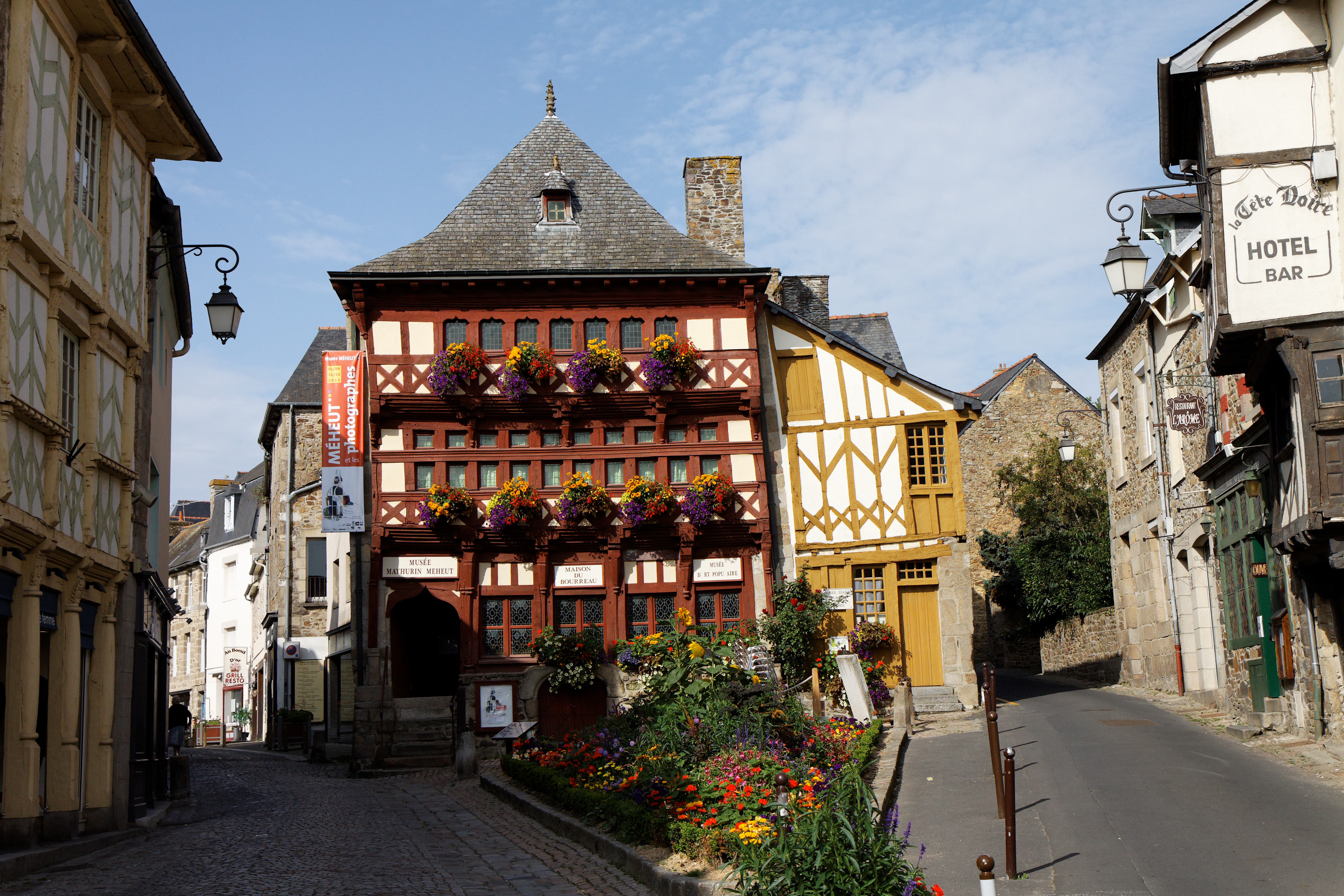 La maison du Bourreau à Lamballe (Côtes d'Armor), abritant le musée Mathurin-Méheut.